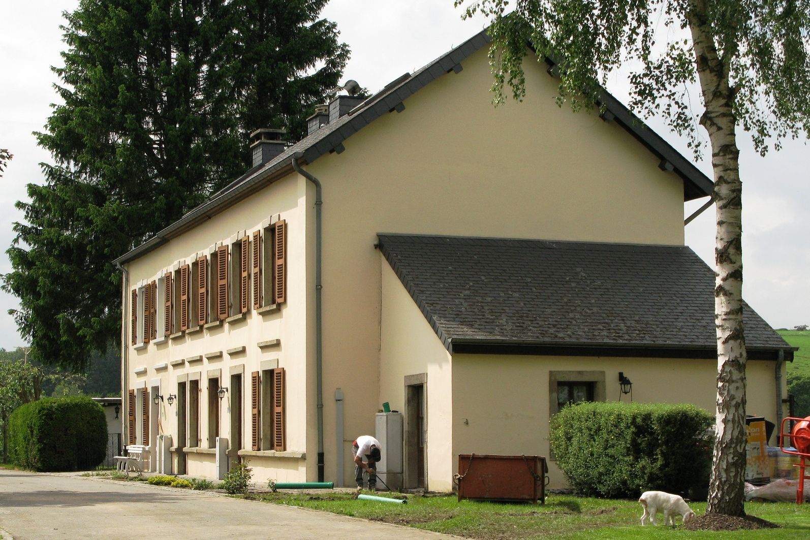 Déi fréier Eisebunneschwunnengen op der Halt vu Schëmpech.